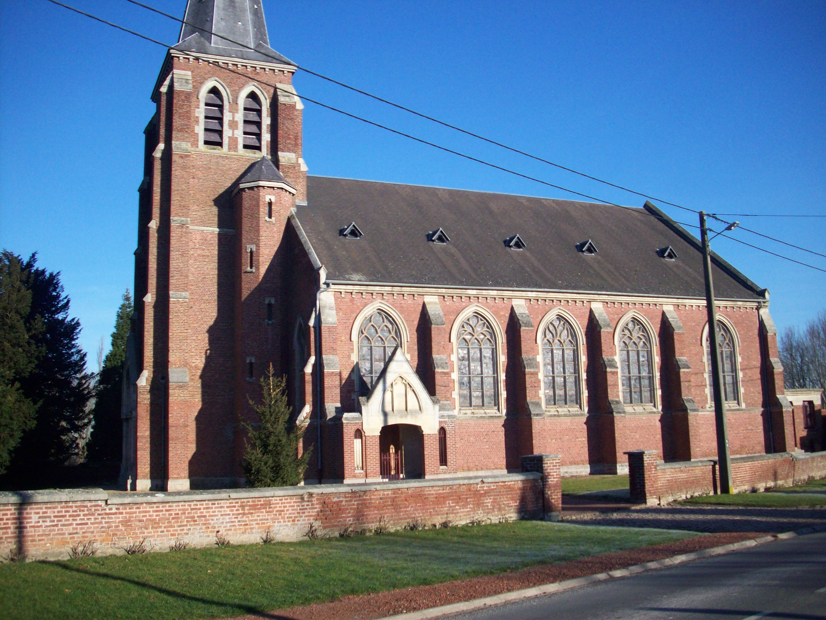 Photo de la façade de l'église Saint Martin d'Inchy-en-Artois